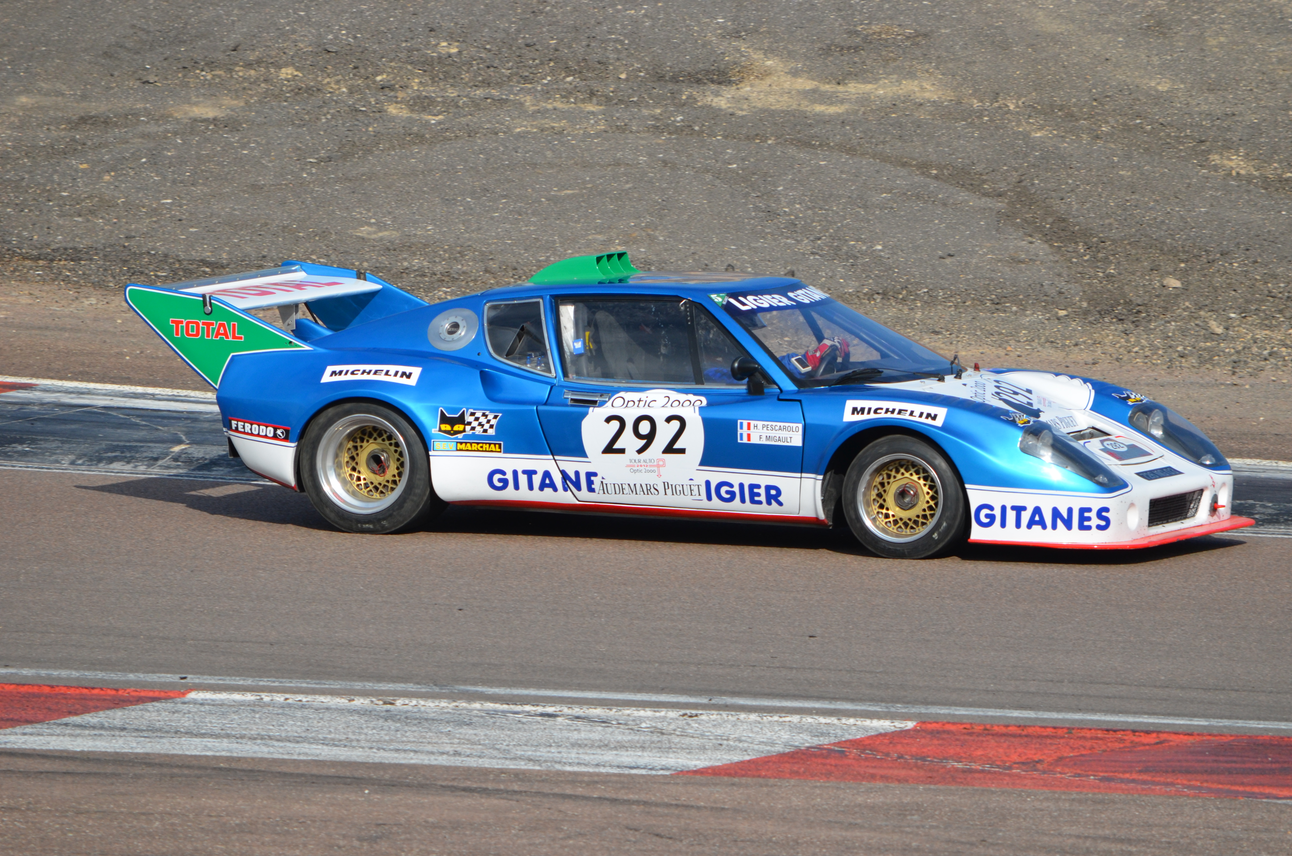 Ligier JS2, numéro 292, Tour Auto 2012, étape sur le Circuit de Prenois.